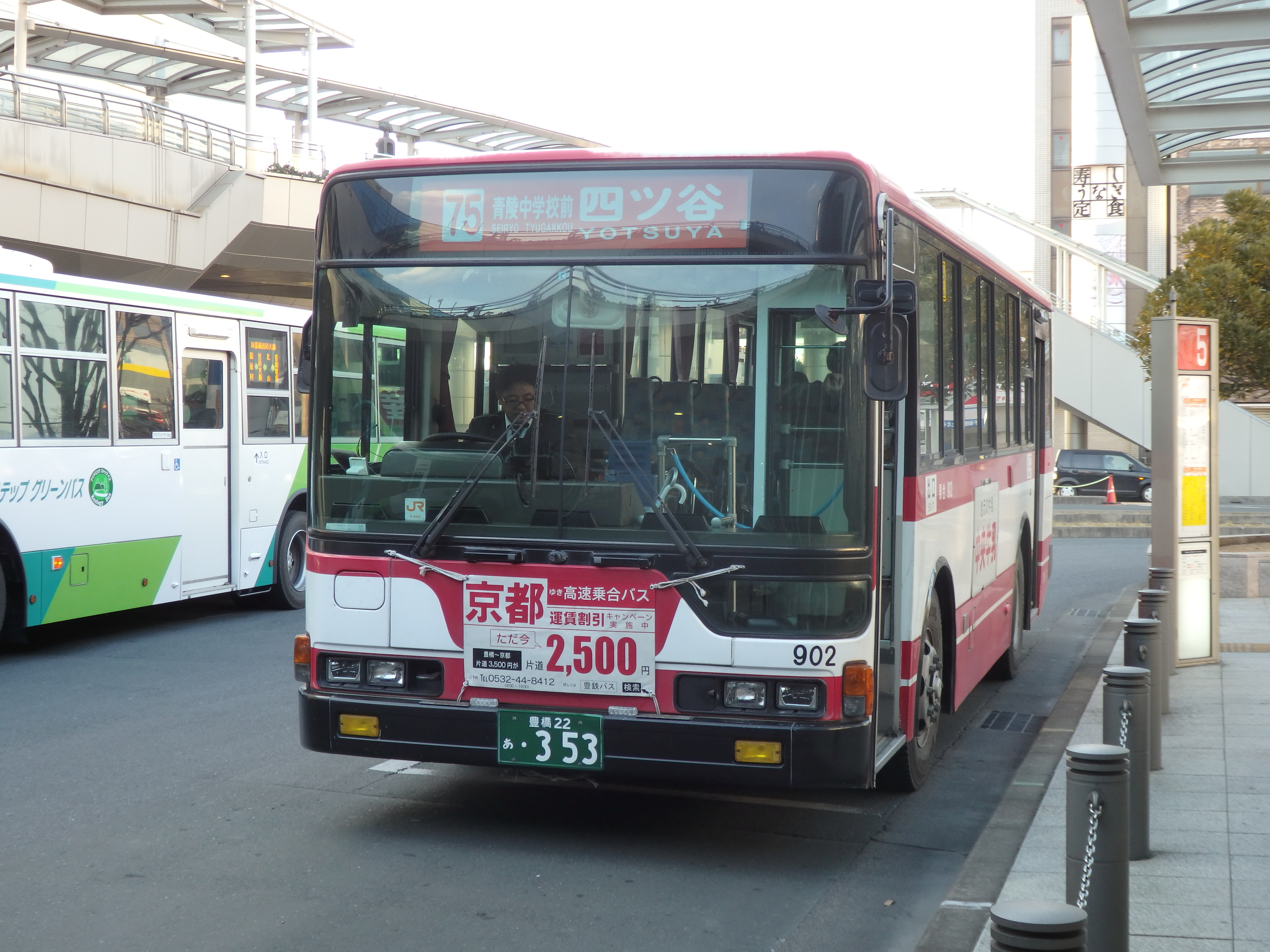 新城営業所所属乗合902